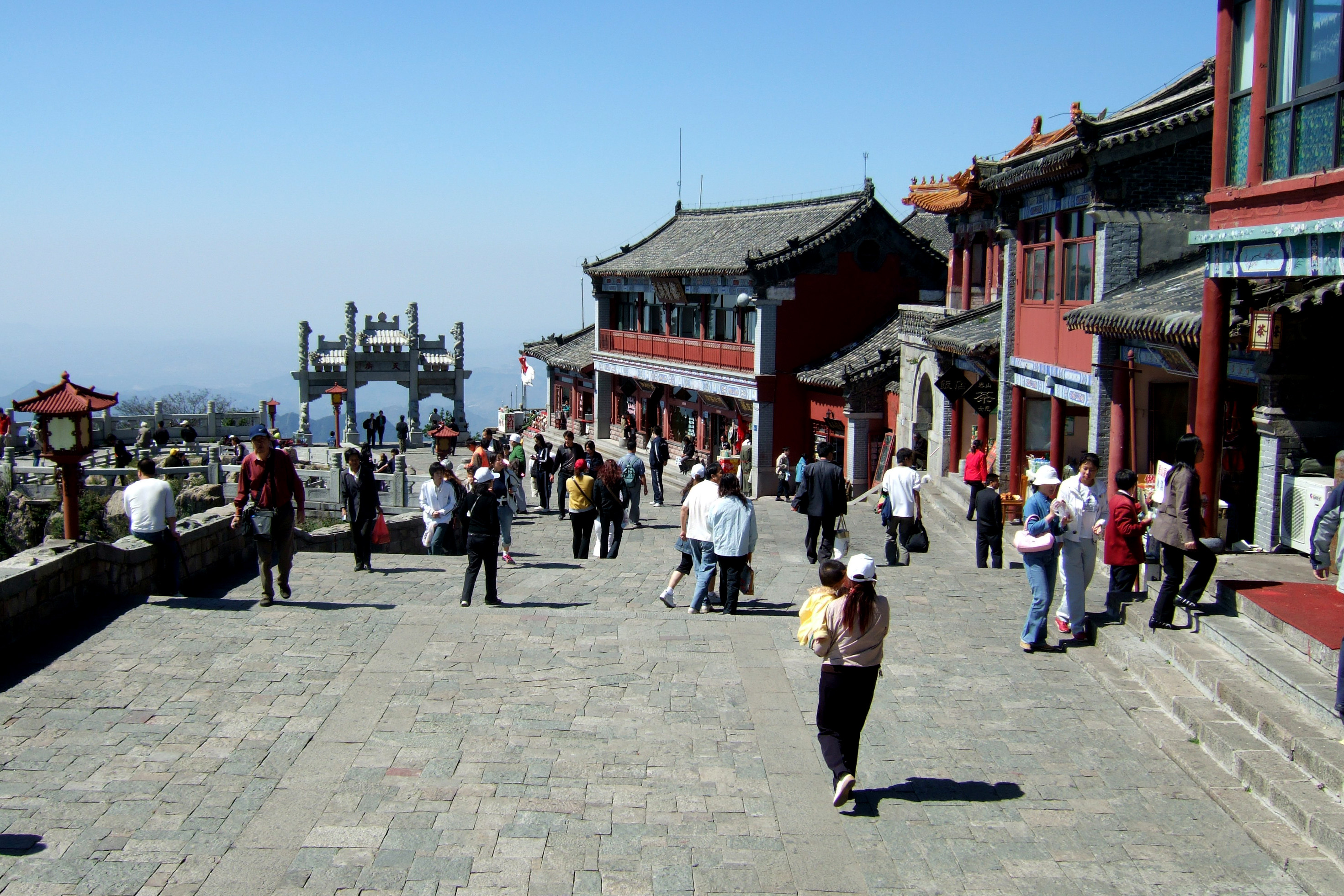 Tai Shan, Shandong, China